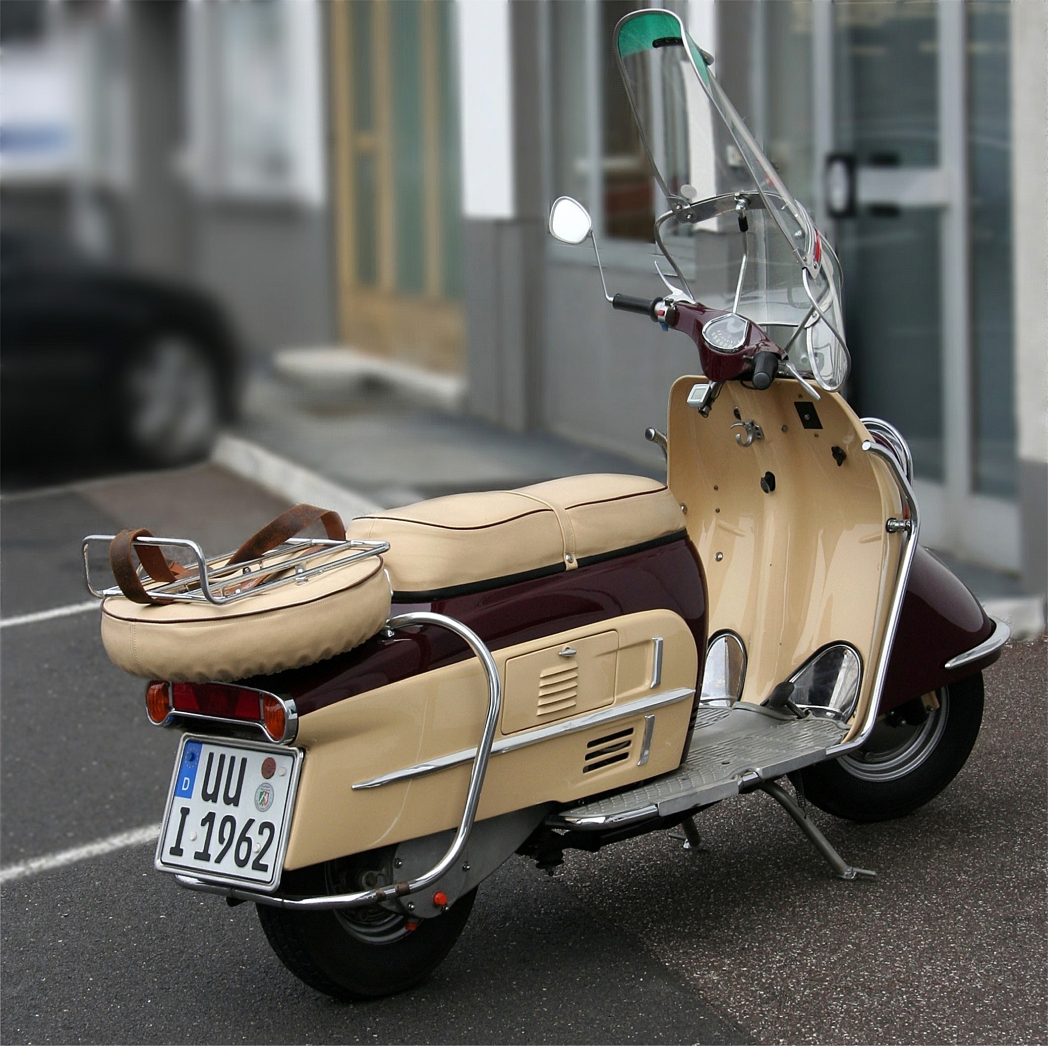 Heinkel Tourist 103 A2, Baujahr 1962, Heck mit integrierten Blinkern (Kennzeichen verändert)